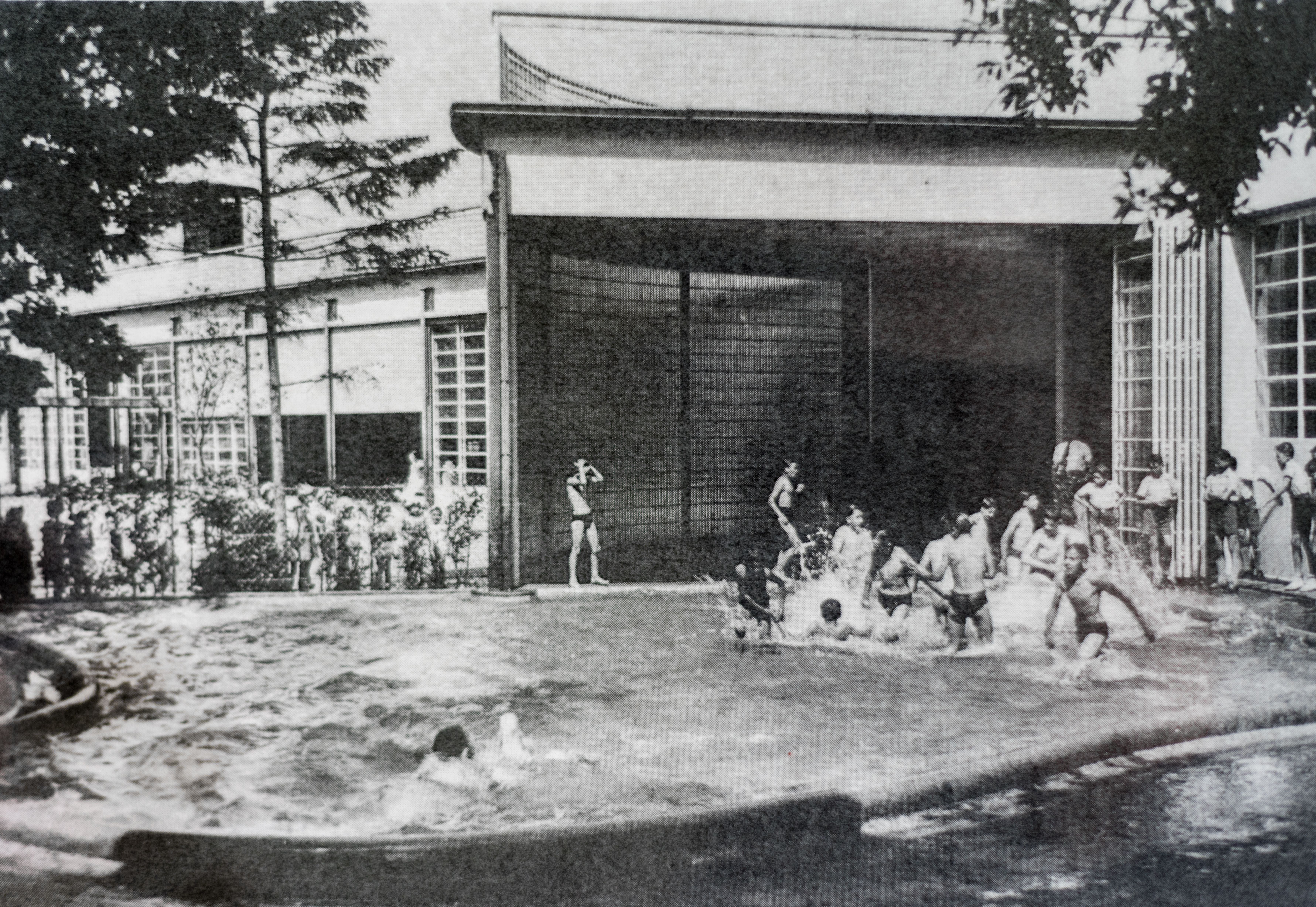 Ecole de plein Air, Suresnes